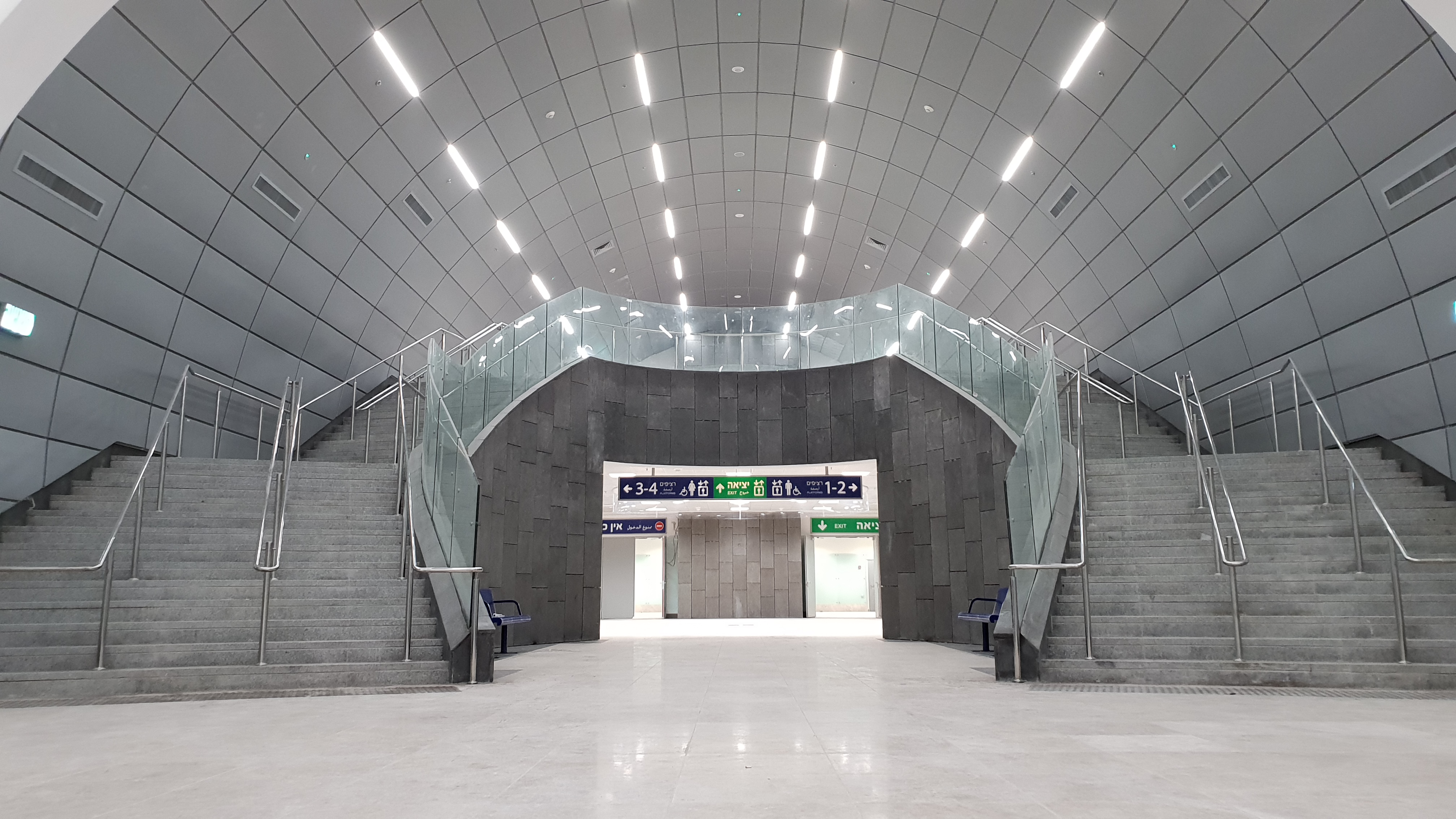 הכניסה למעליות בתחנת הרכבת נבון במפלס התחתון